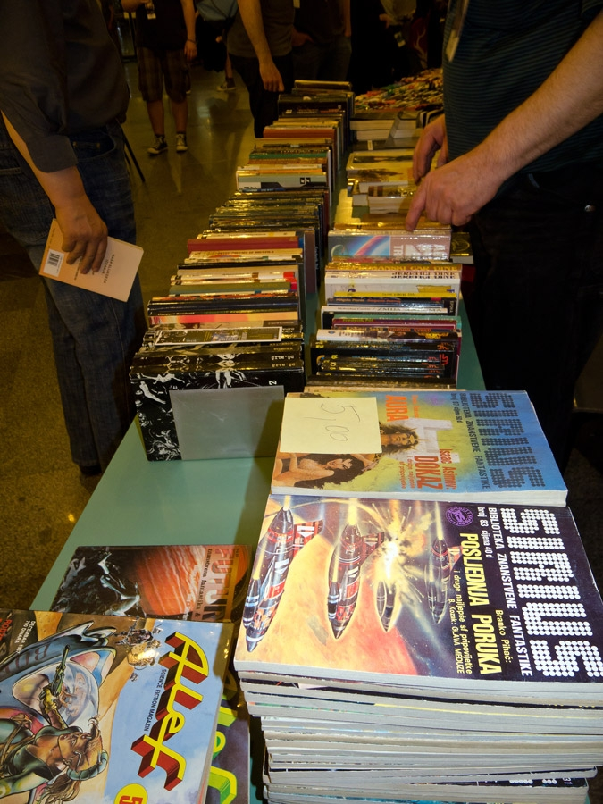 Konvencija Kontakt, koja je spojila 34. SFeraKon i 34. Eurocon u Zagrebu